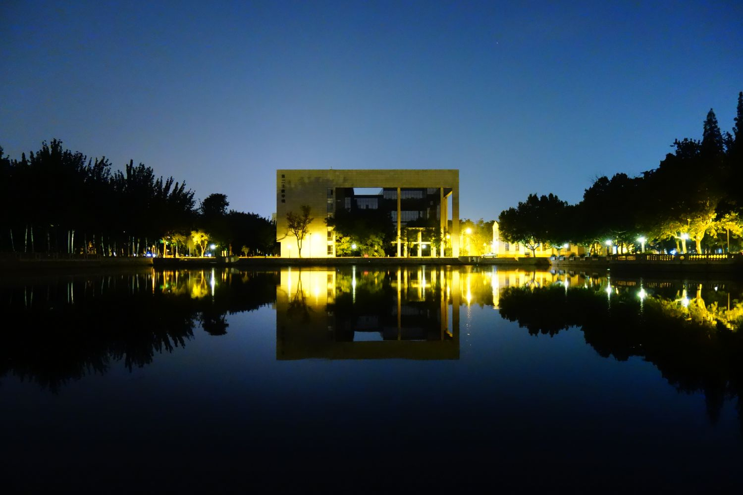 中文（中国大陆）: 南开大学新开湖夜景